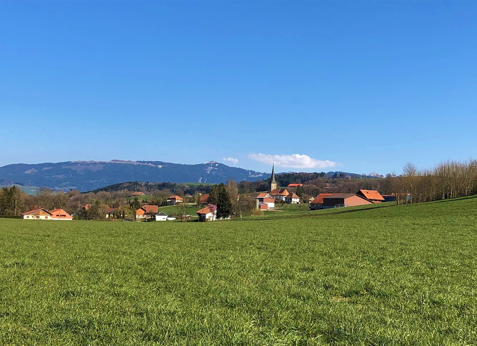 Vue générale d'Estavayer-le-Gibloux